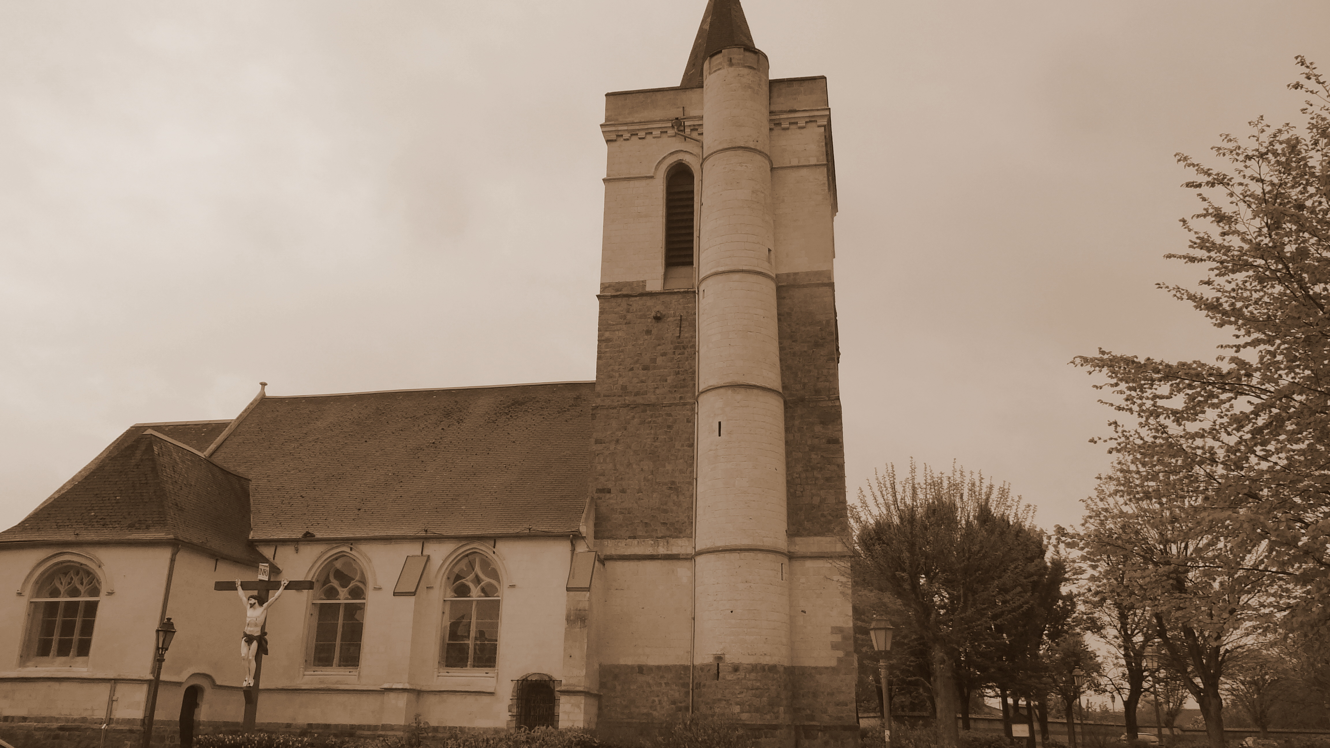 Sailly la Bourse - Eglise